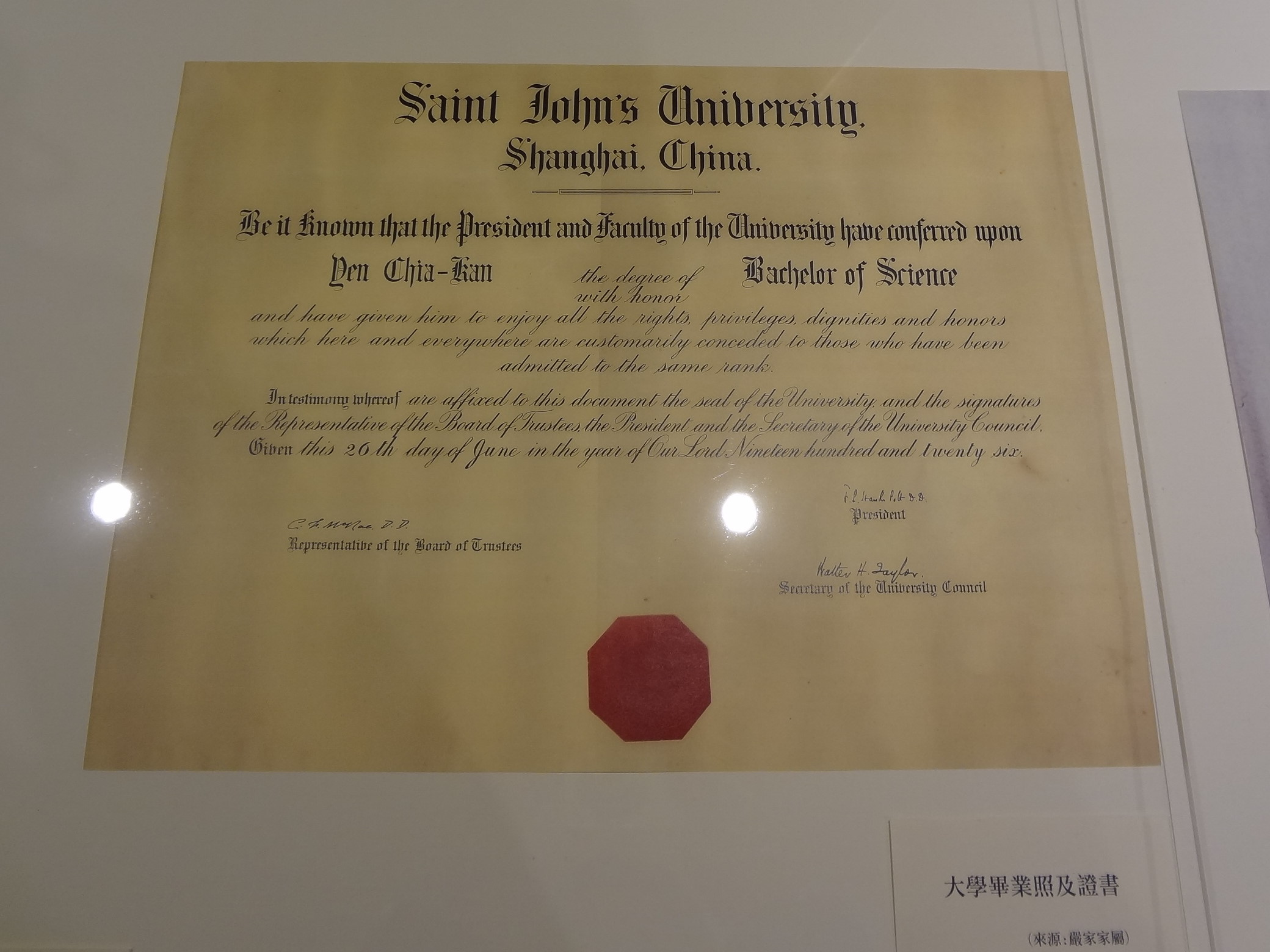 中文（台灣）: 中華民國國立國父紀念館展示的嚴家淦文物：聖約翰大學嚴家淦畢業證書。